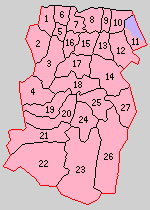 大分県宇佐郡の町村制時点の町村。